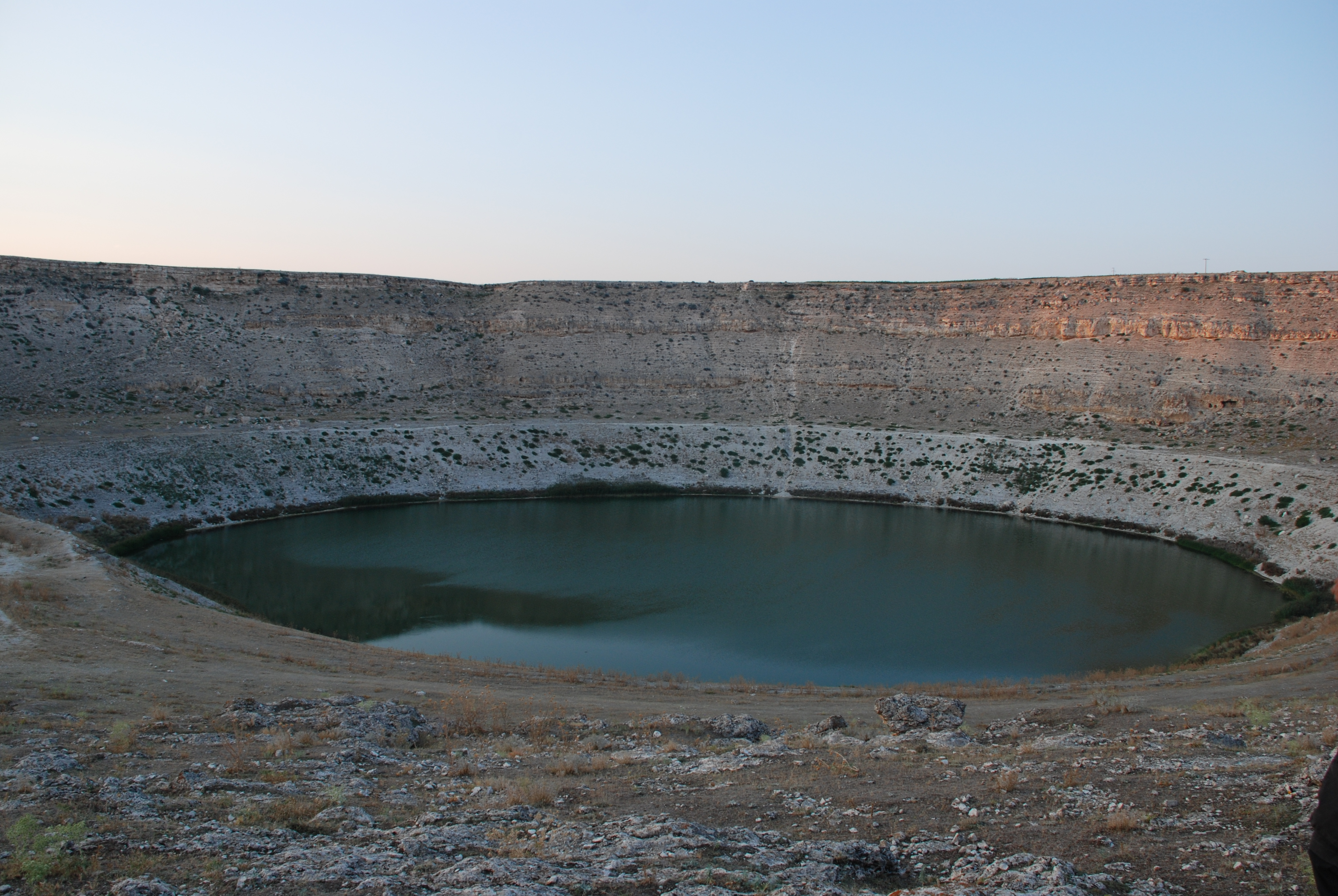 Meyil Obruğu, Obruk Platosu